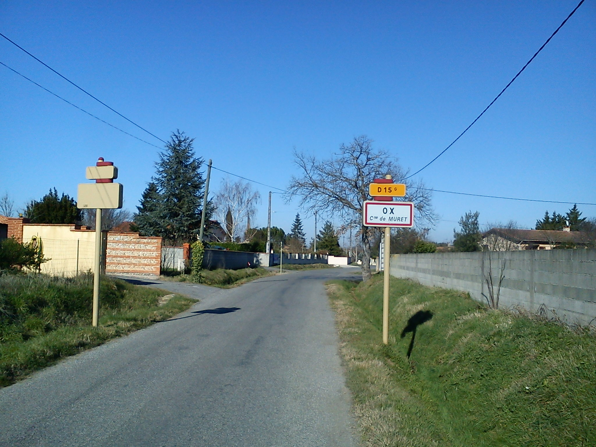 Ox commune de Muret